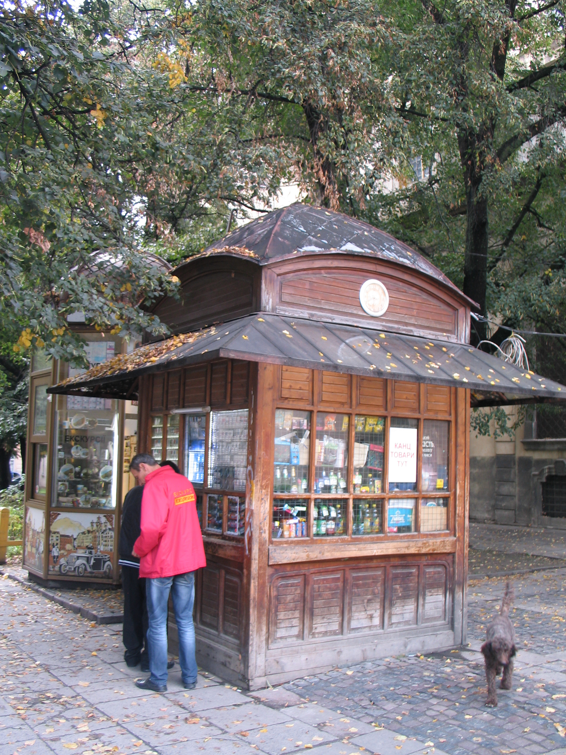 Газетный киоск на Музейной площади во Львове